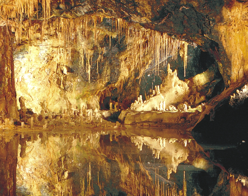 Märchendom